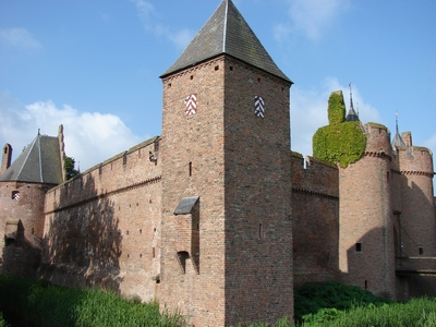 Kasteel, Doornenburg